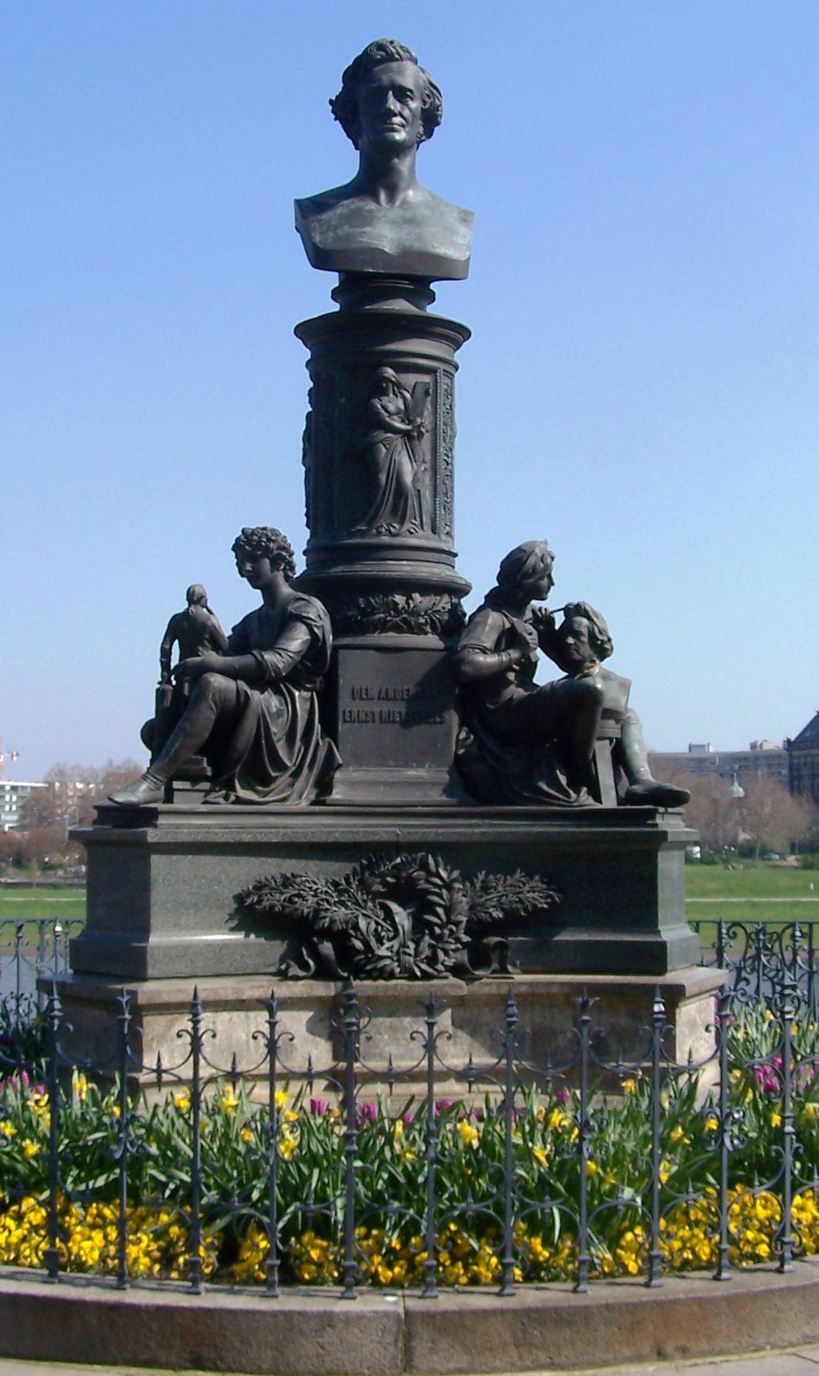 Ernst-Rietschel-Büste von Johannes Schilling auf der Brühlschen Terrasse in Dresden